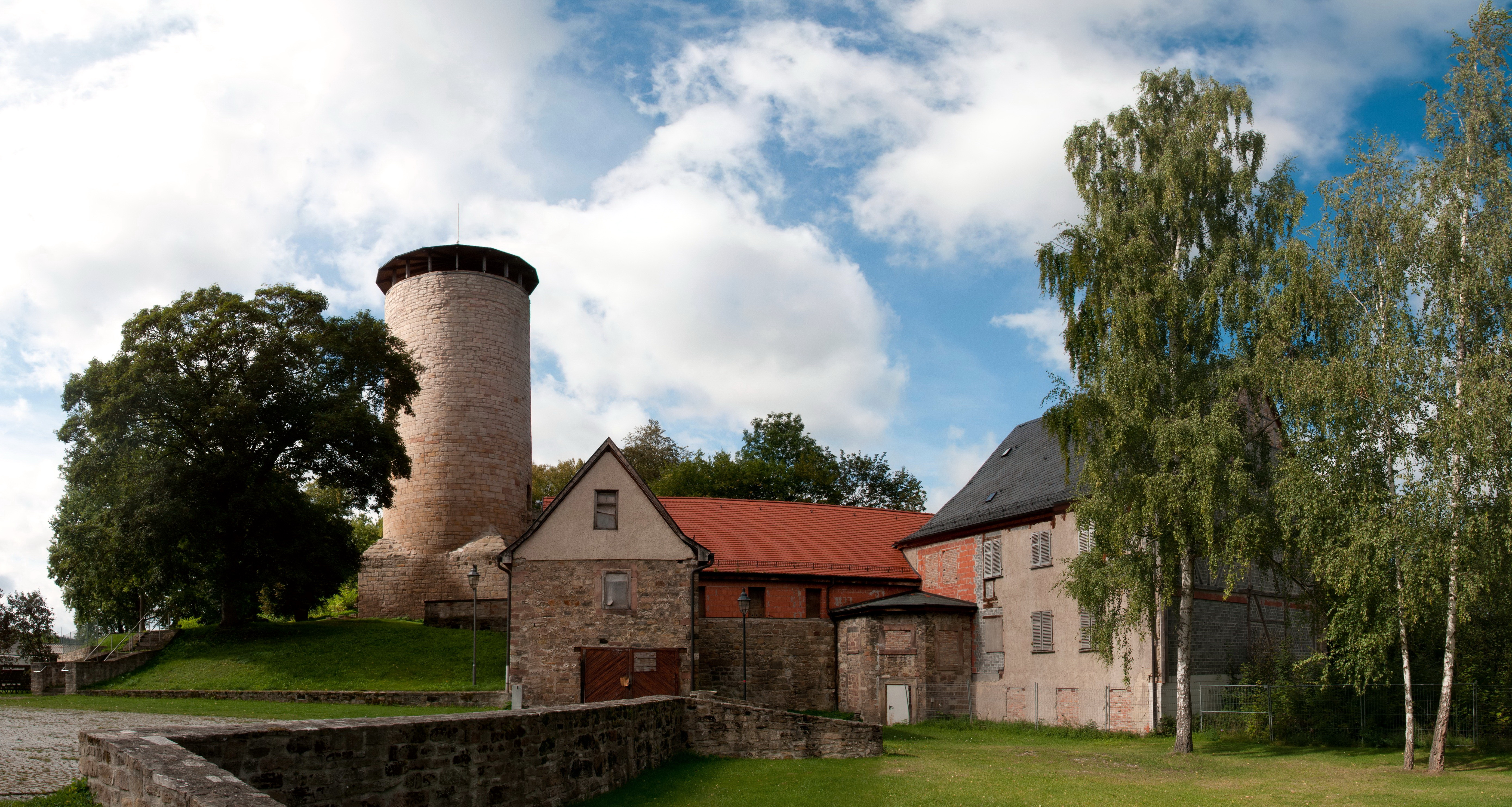 Burgruine und Schloss Tannroda